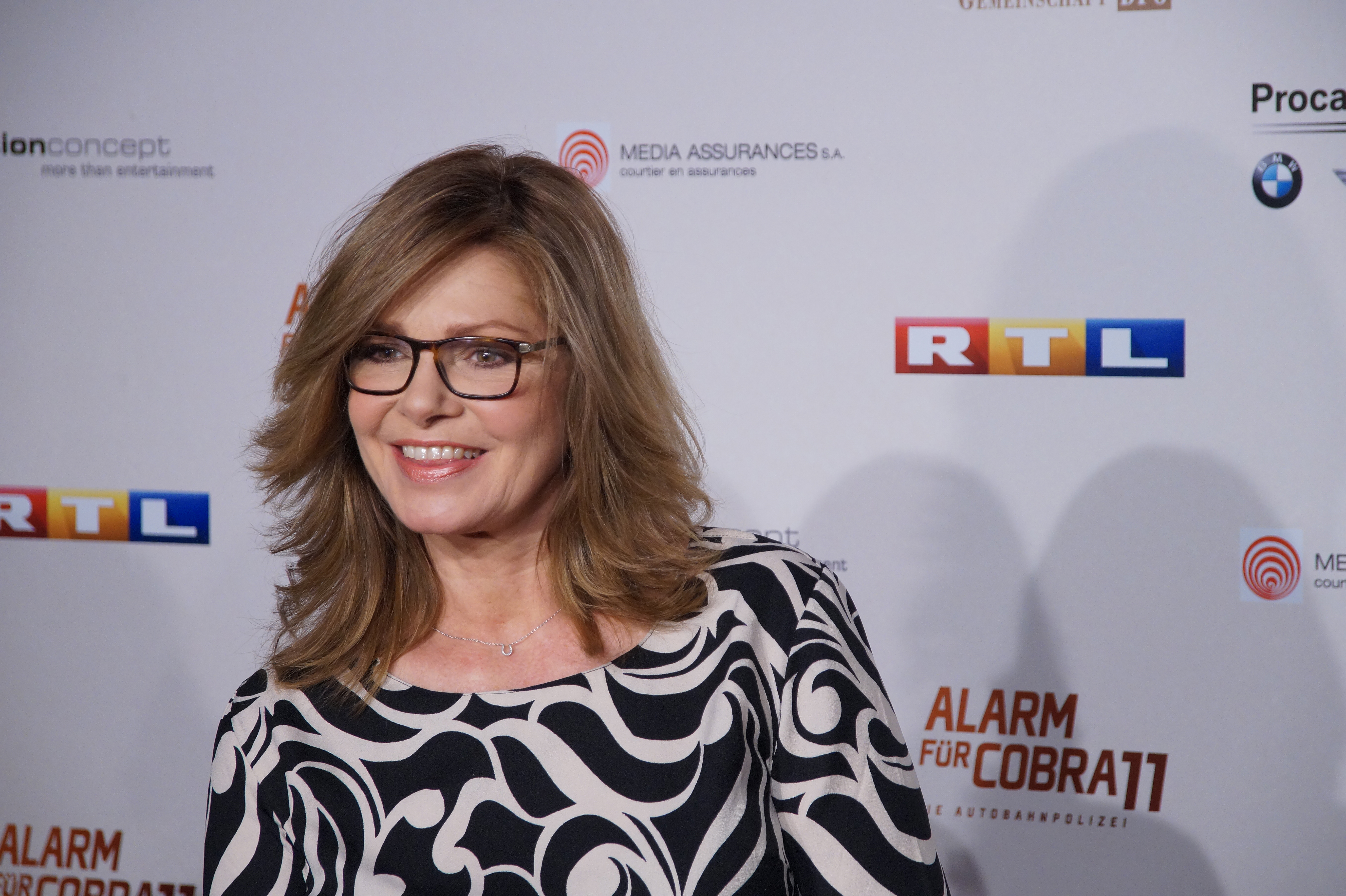 Maren Gilzer bei der Premiere von der 300. Folge 'Alarm für Cobra 11', April 2016.